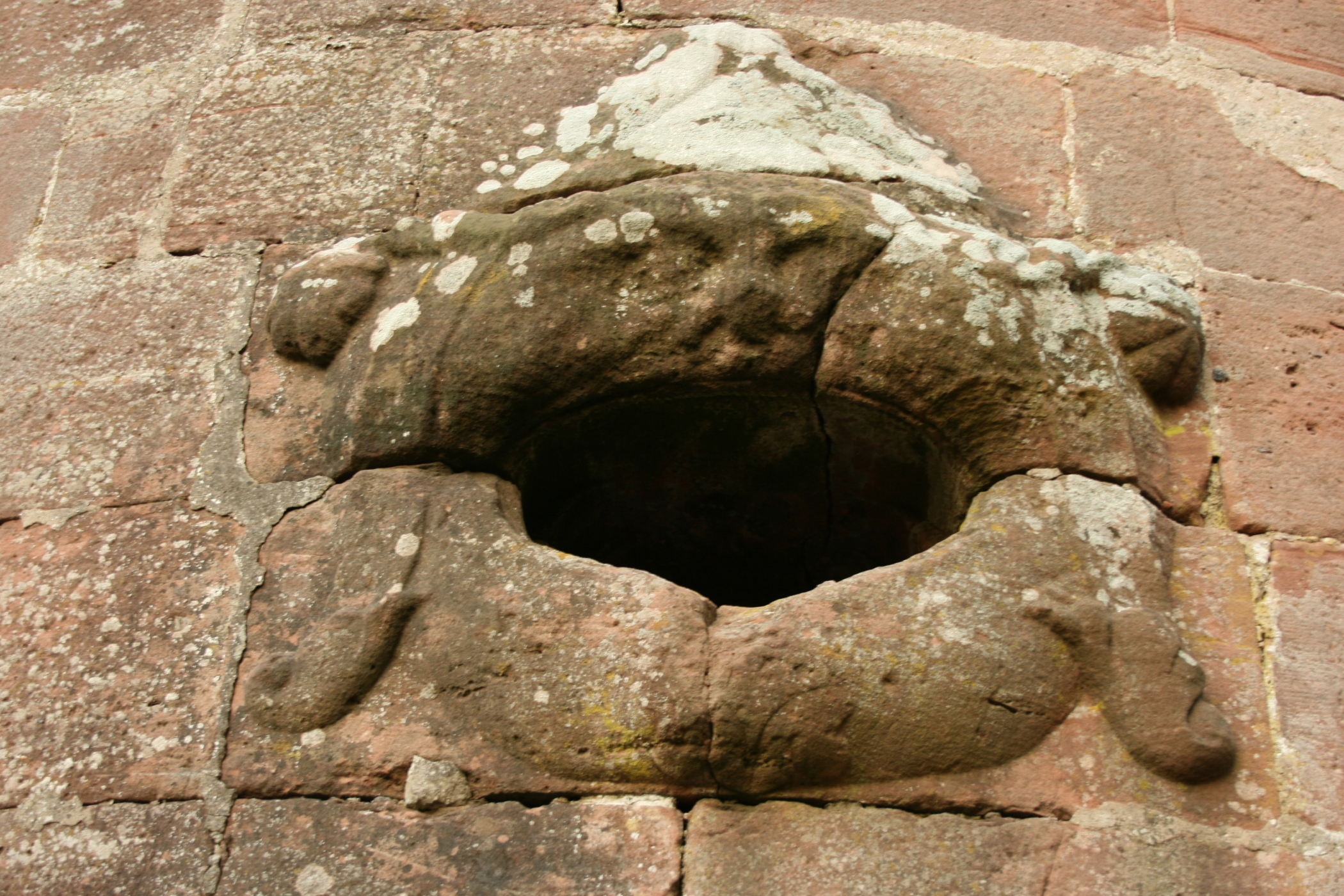 Burg Neudahn, Detail des südlichen Batterieturms. Geschützöffnung.